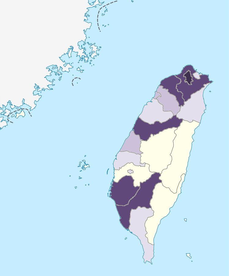 中文（台灣）: 臺灣各直轄市／縣市如來宗精舍的信徒人數（數據由如來宗官方網站提供，截至2015年12月） 超過8,000名信徒 6,001至8,000名信徒 4,001至6,000名信徒 2,001至4,000名信徒 0至2,000名信徒 不詳／不適用